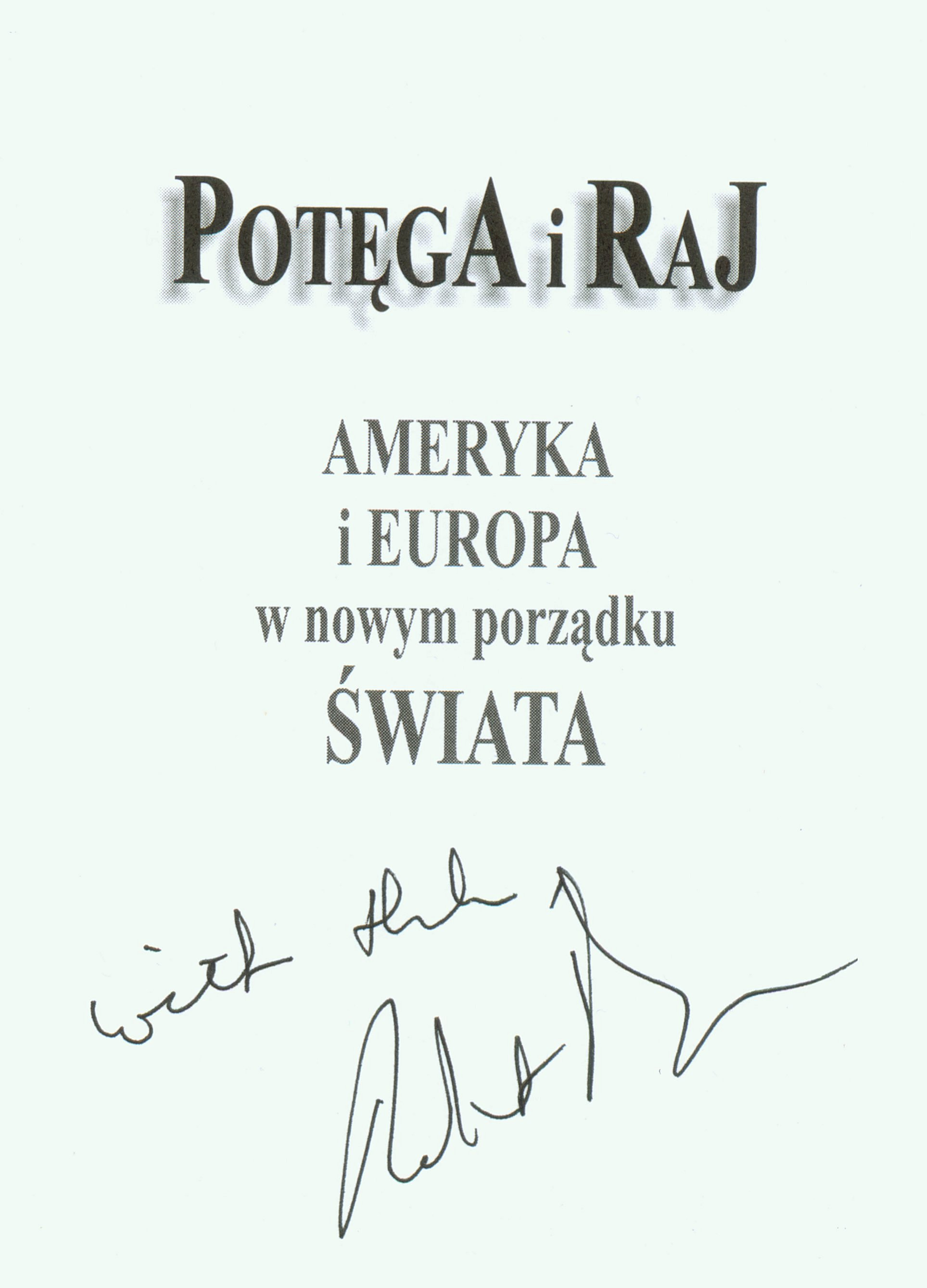 Robert Kagan (b. 1958)'s autograph